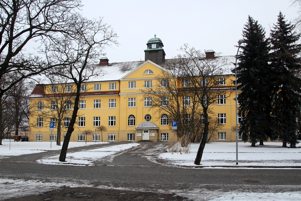 Königliches Feuerwerkslaboratorium Radeberg, Verwaltungsgebäude